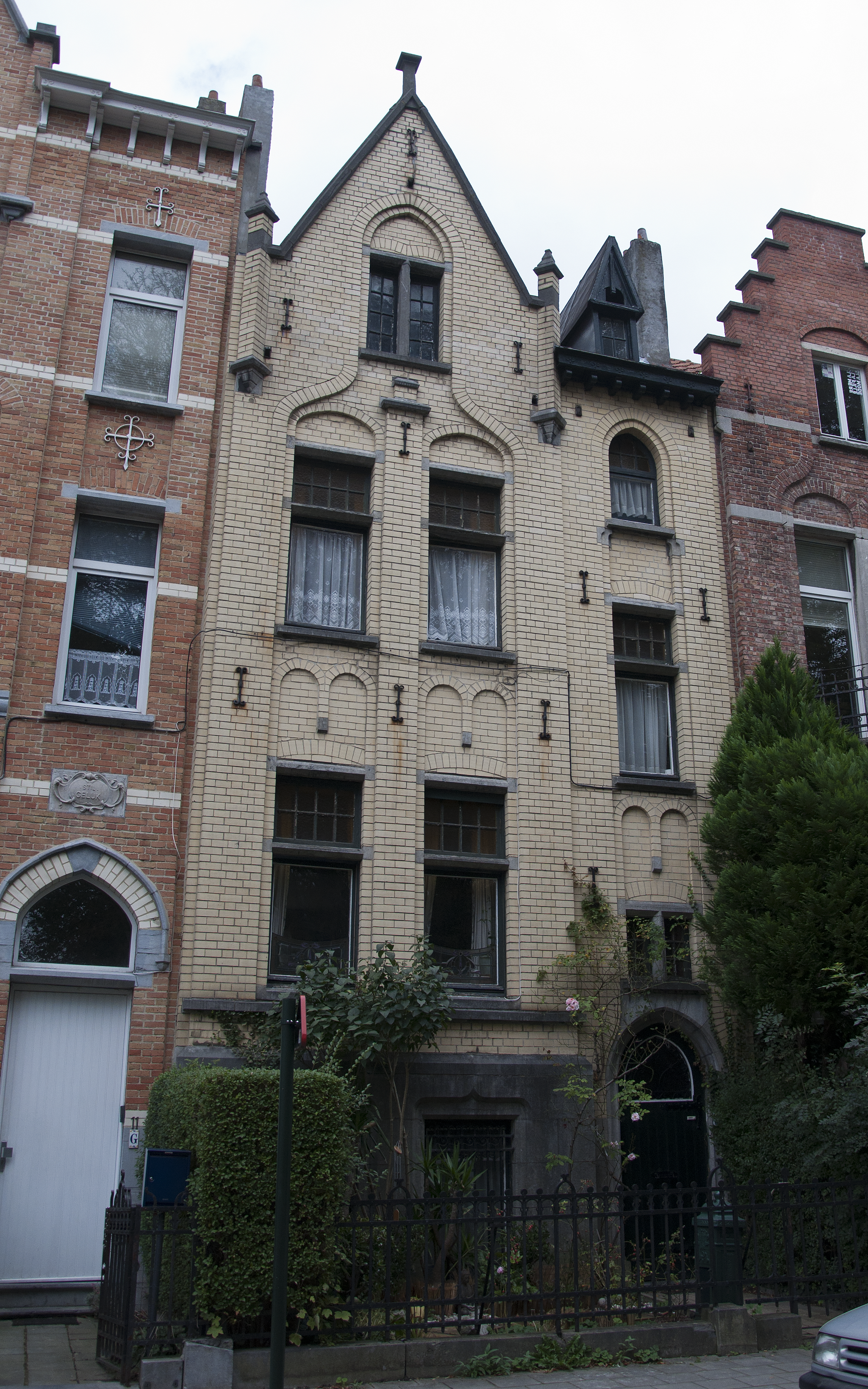 Bel-étagewoning aan de de Vrièrestraat 13 te Laken, België waarin een tijdlang de schrijver Karel van de Woestijne woonde